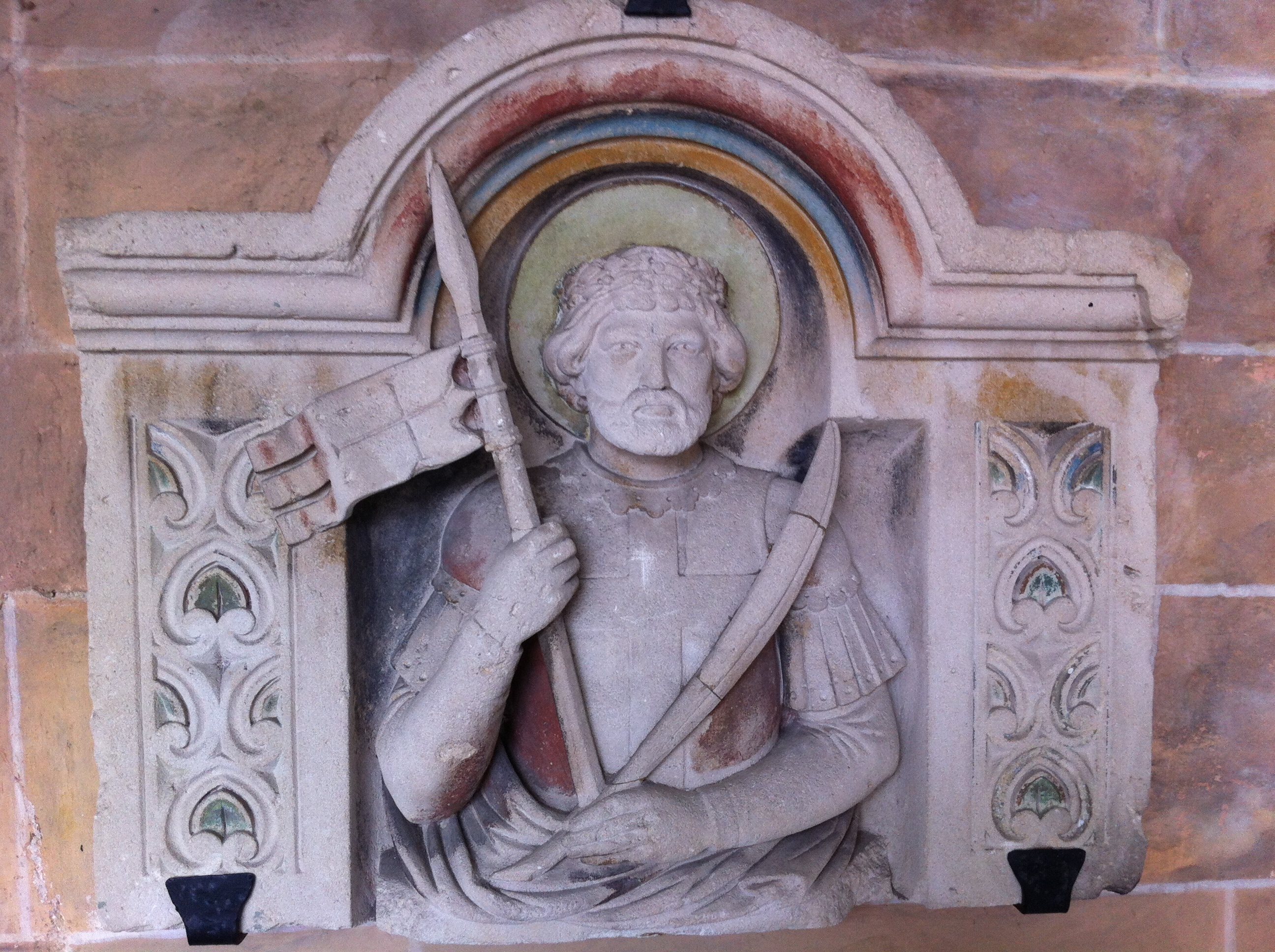 Demi relief de Saint Crisant à l'église de saint Crisant et sainte Daria